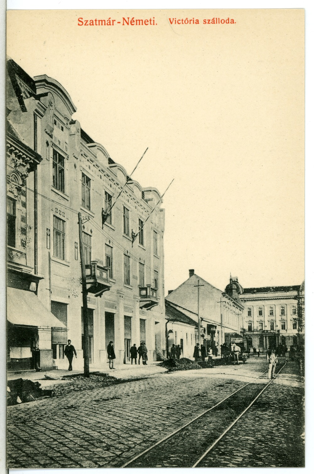 Szatmar-Nemeti; Victoria szalloda This postcard is from publisher Brück & Sohn in Meißen ( postcard has a unique number 13459 and is available in a higher resolution at the publisher. This images was uploaded in a cooperation project between Wikipedians and the publisher.